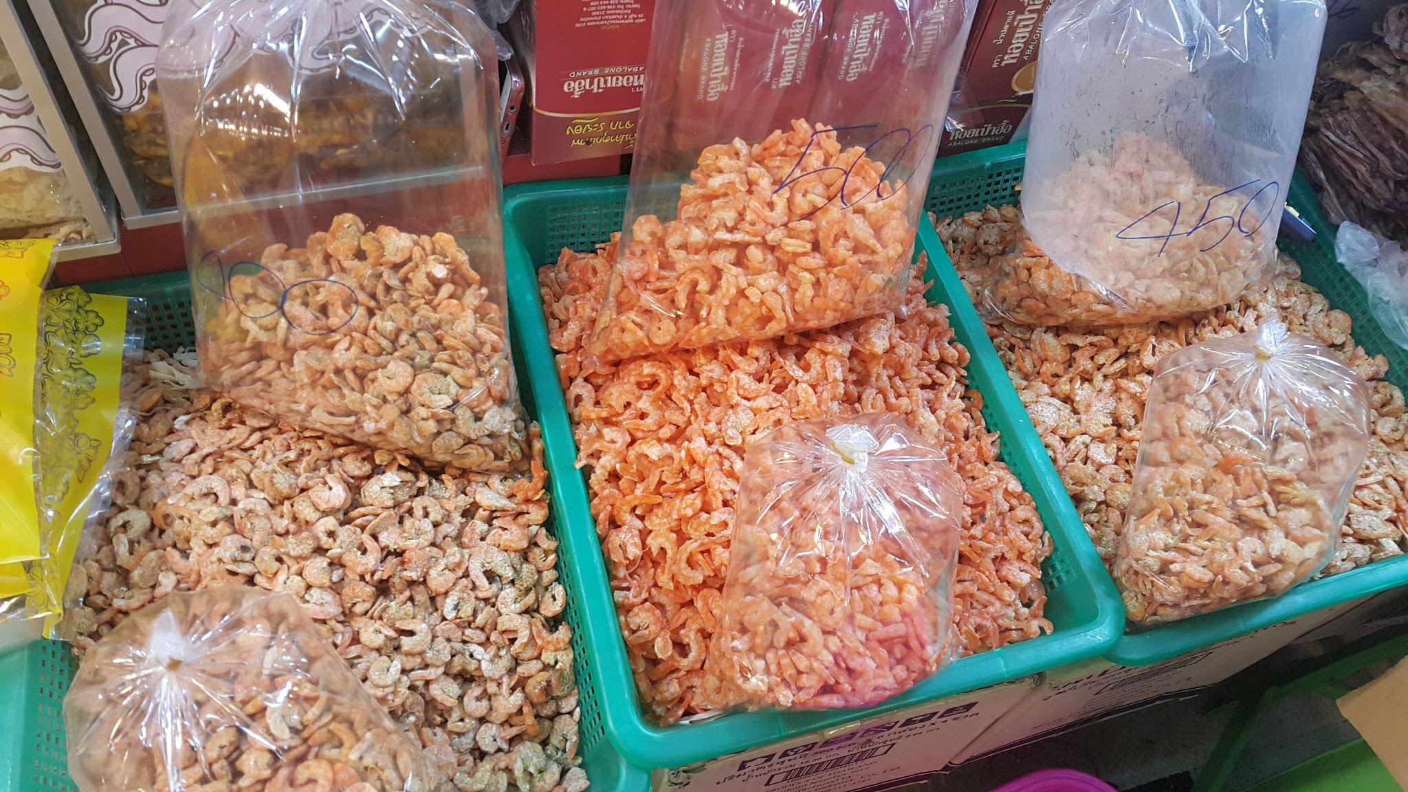 กุ้งแห้ง